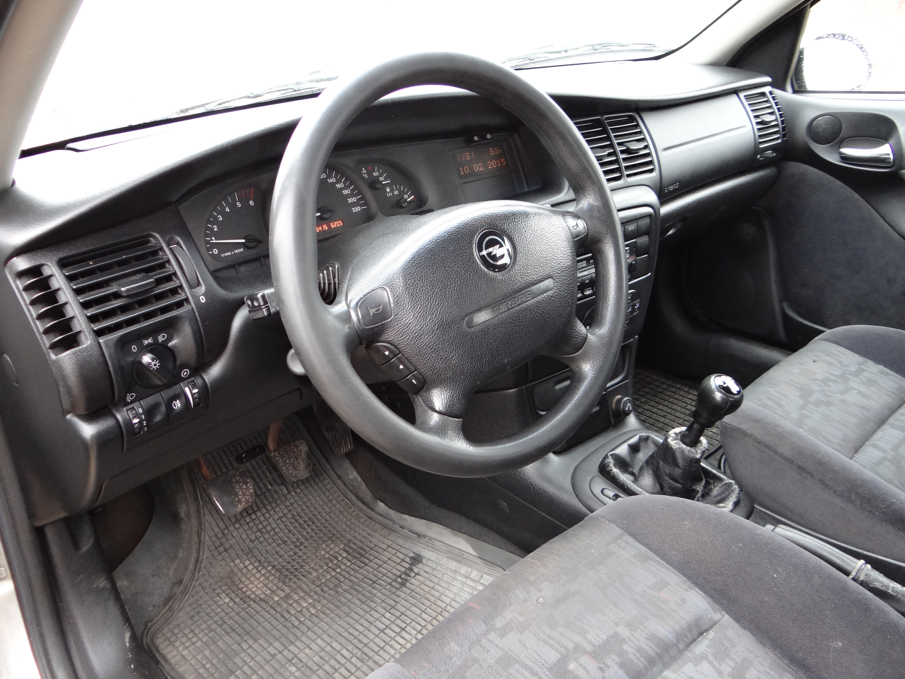 Opel Vectra B 2.0 TDI EcoTec 16V '99